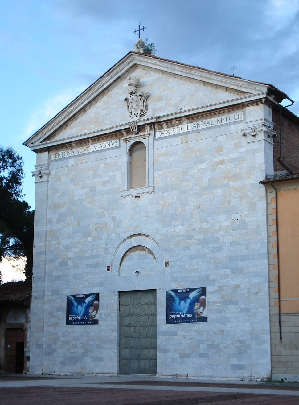 Facciata della Chiesa di san Francesco - Pisa